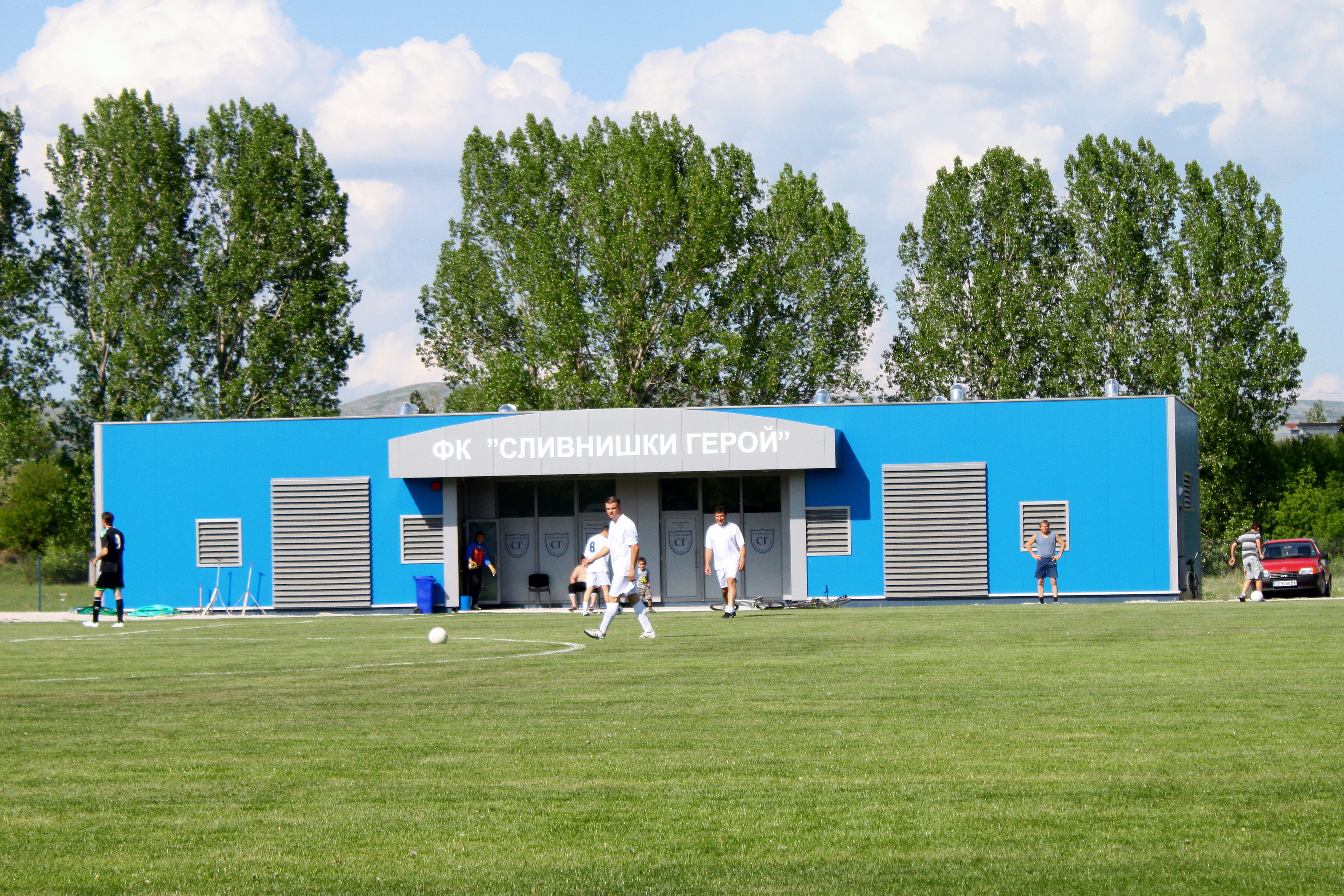 Новата сграда на стадион "Сливнишки герой", май 2012 г.